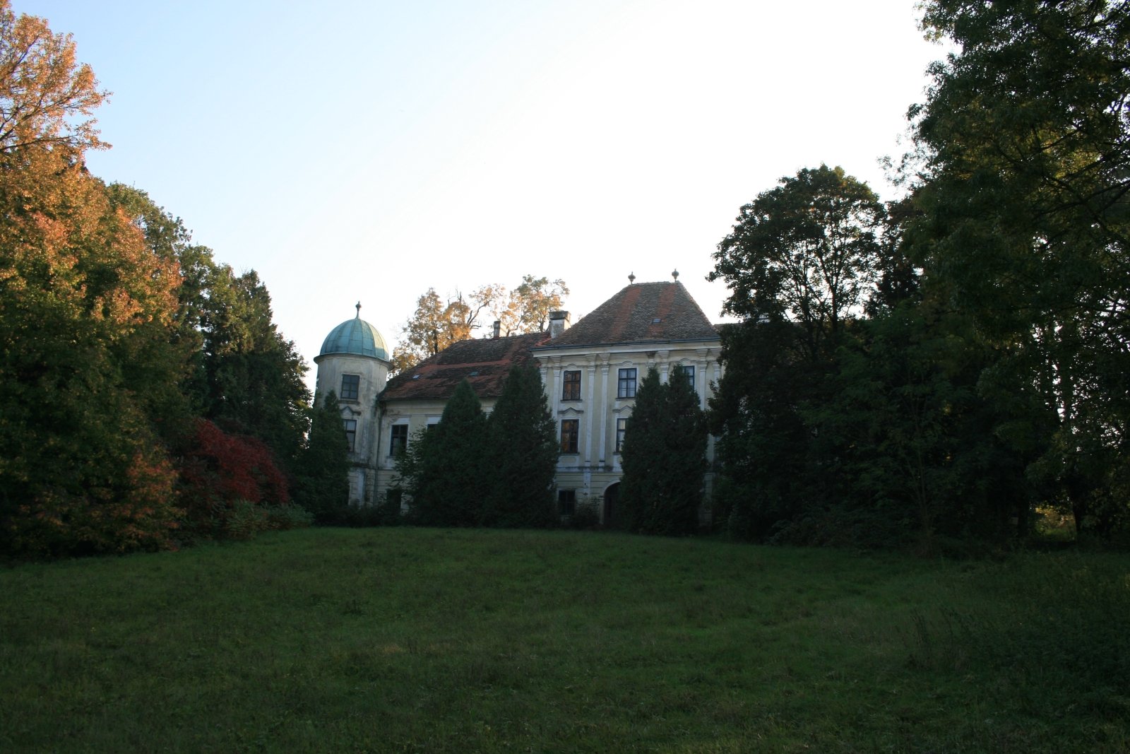 Dvorac Brezovica sjeverno pročelje